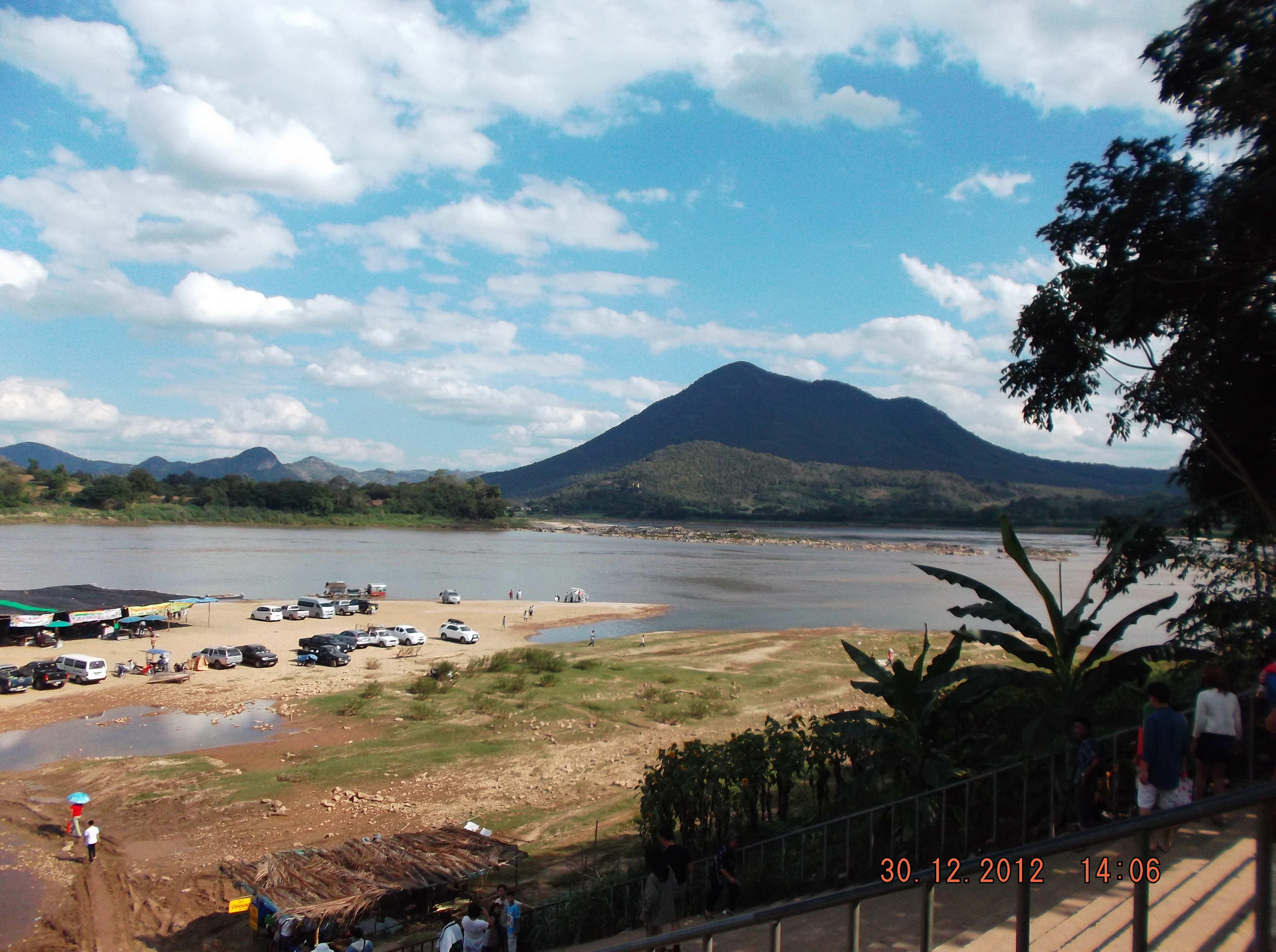 แก่งคุดคู้ Kaeng Khut Khu